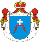 Brama arms